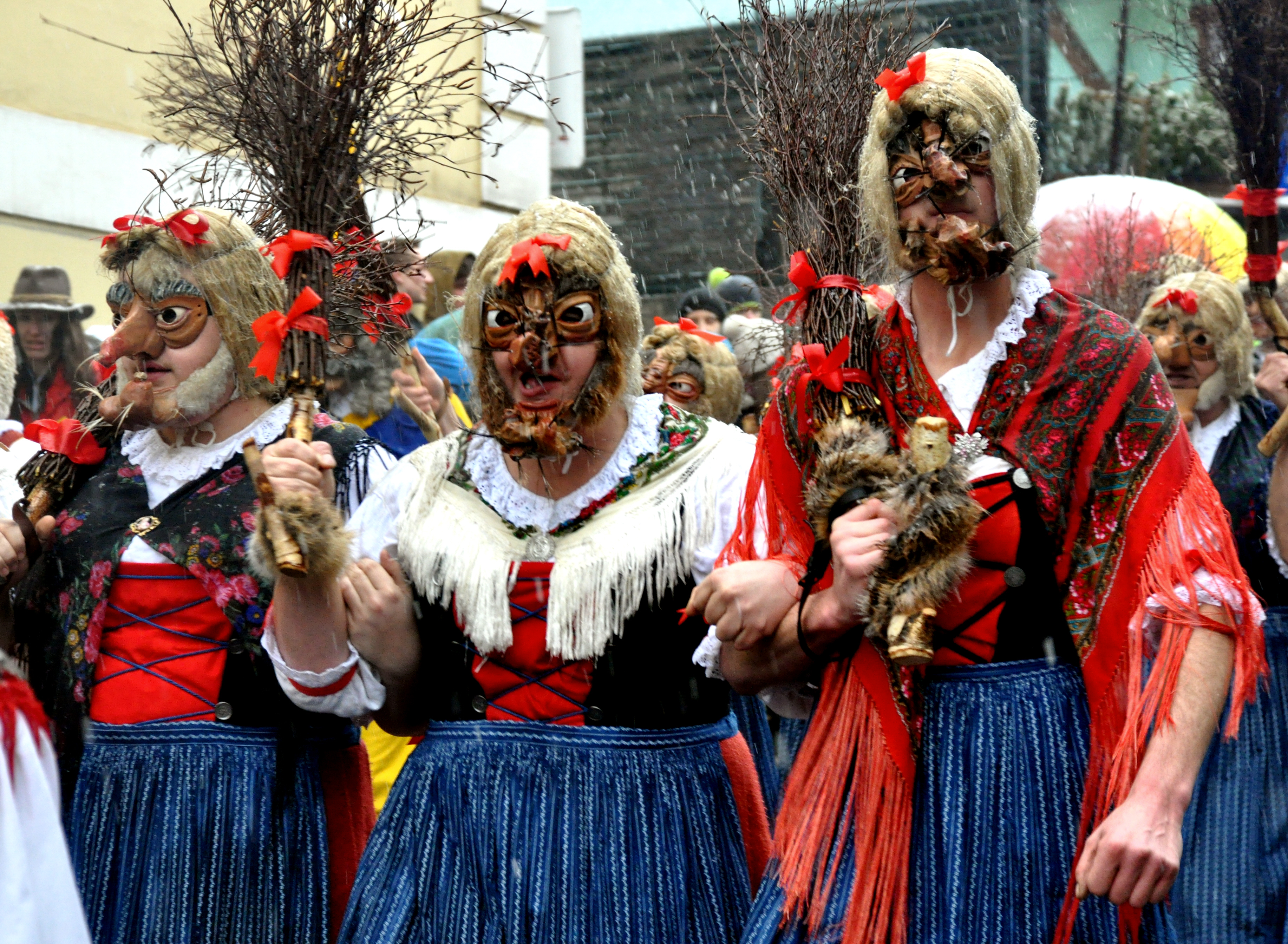 Imst (Tirol), Imster Schemenlaufen 2016, Hexen